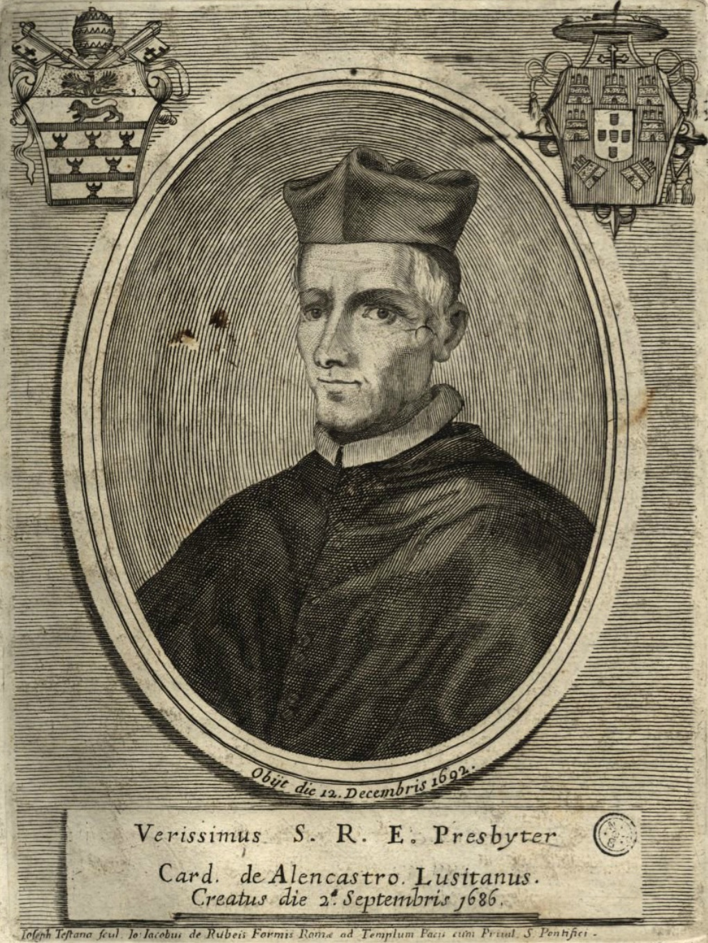 Cardeal Veríssimo de Lencastre (1615-1692)